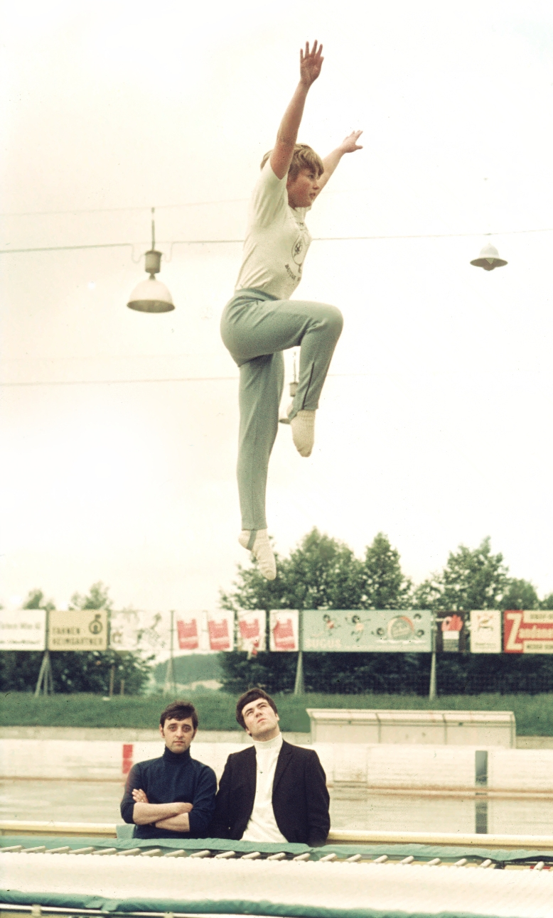 Milena Duchková, Olympiasiegerin im Turmspringen 1968 und 1972, 1970 in Zürich,Demonstration eines Aufsatzsprunges am Trampolin